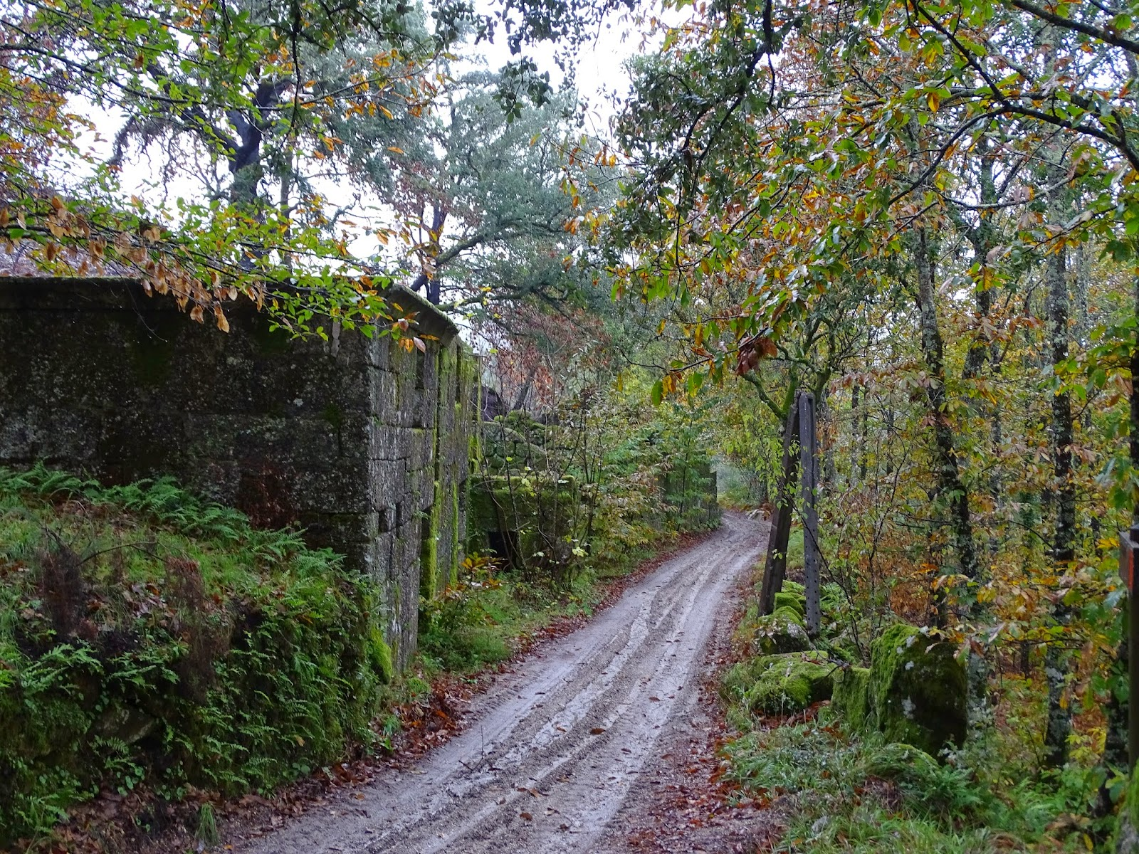 Amarante Velha Estalagem do Marão